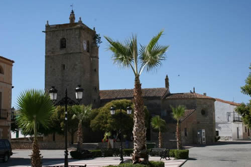 Plaza Mayor de Aldea del Cano